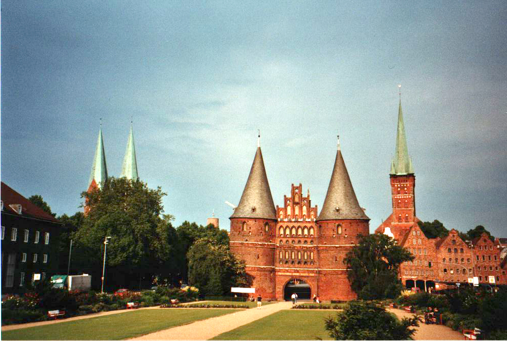 Lübecker Holstentor von der Westseite.